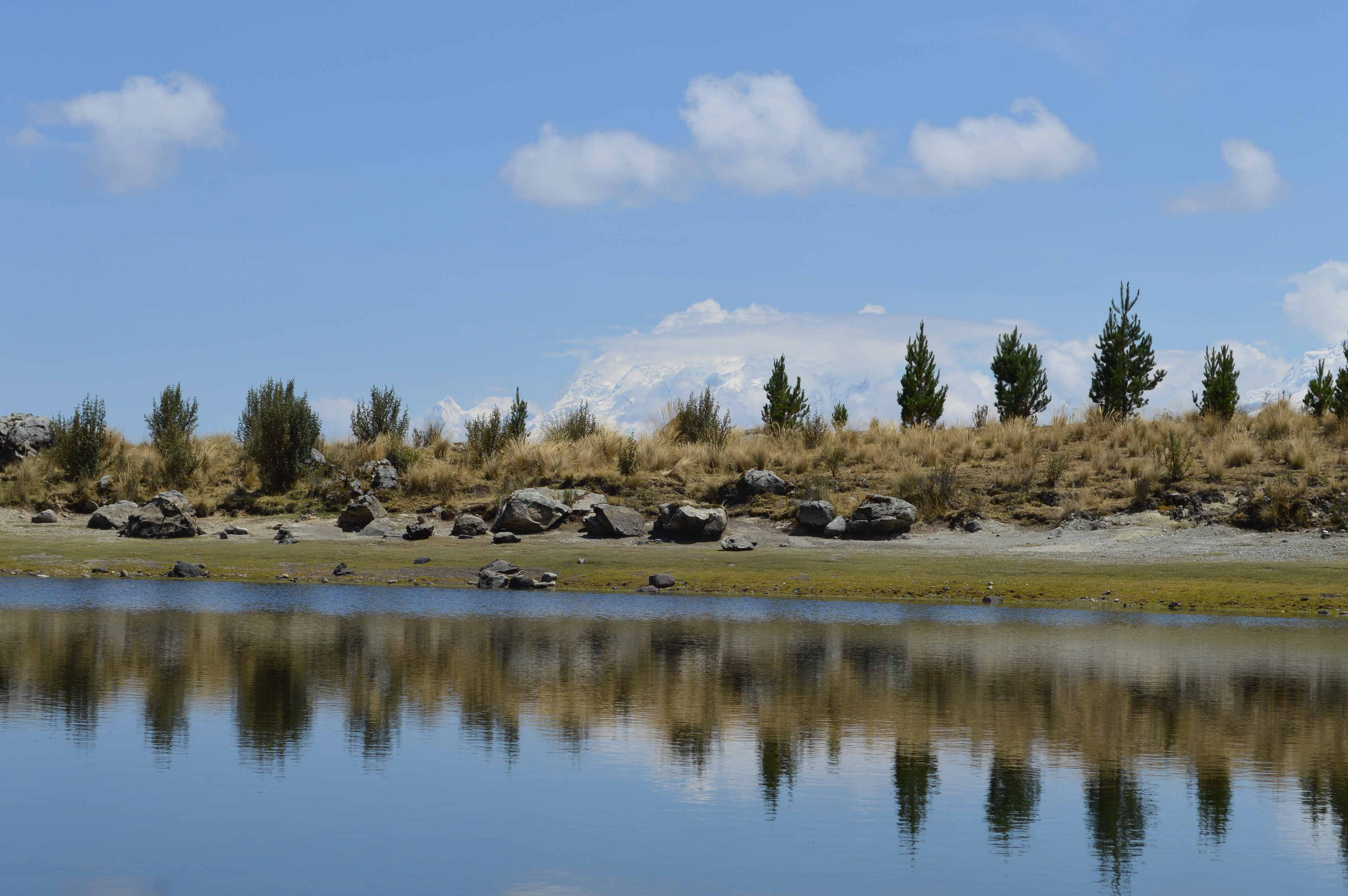 Foto tomada en la laguna Radián, en el distrito de Independencia de la provincia de Huaraz, Áncash - Perú, lunes 30 de septiembre de 2019.